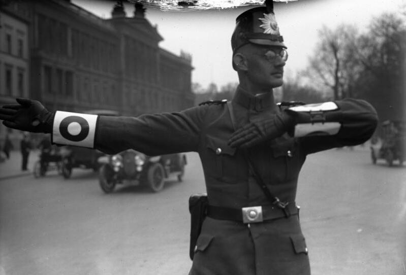 Eine Neuregelung im Berliner Verkehr. Verkehrspolizei-Beamte mit weissen Armbinden mit darauf befindlichen roten Ring, wodurch die Zeichen des Beamten weiterhin sichtbar sind.